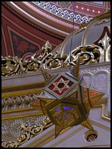 A zsinagóga örökmécsese (Dohány utcai zsinagóga, Budapest)